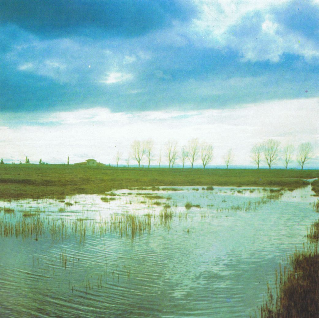 Humedales de la Mancha húmeda